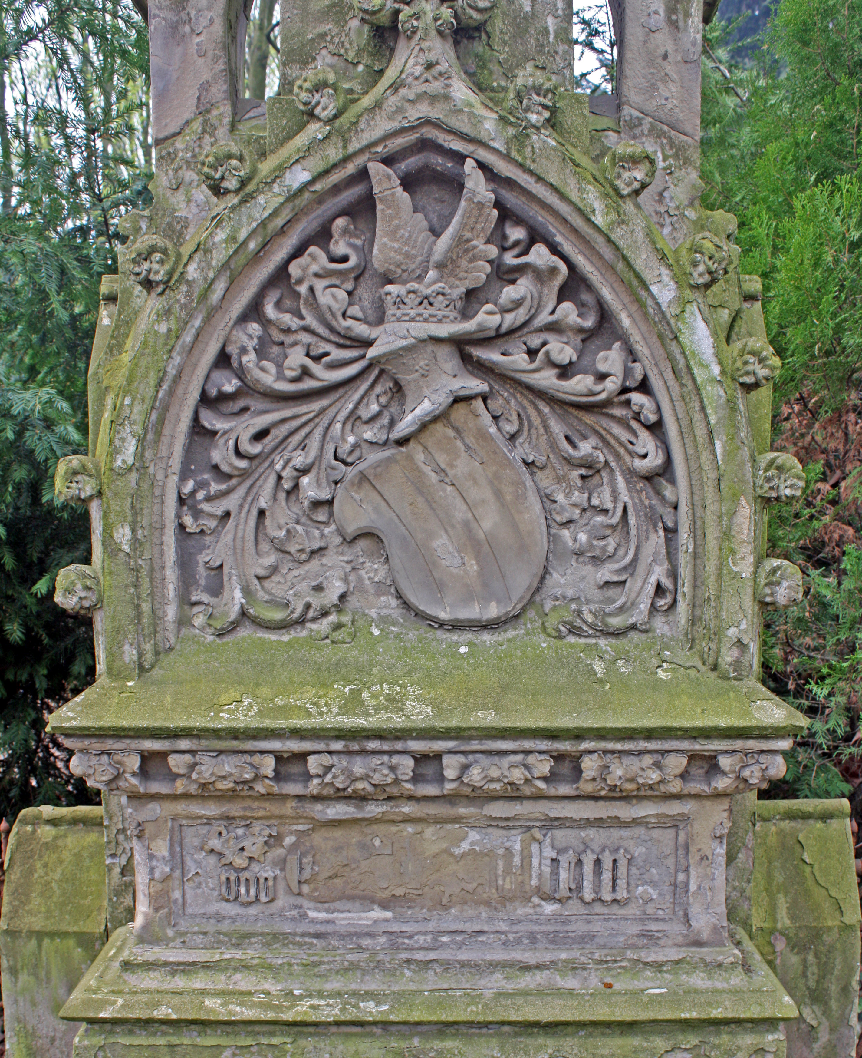 Wappen der Familie von Wittgenstein Köln. Bildausschnitt des Familiengrabmals auf dem Melaten-Friedhof Köln